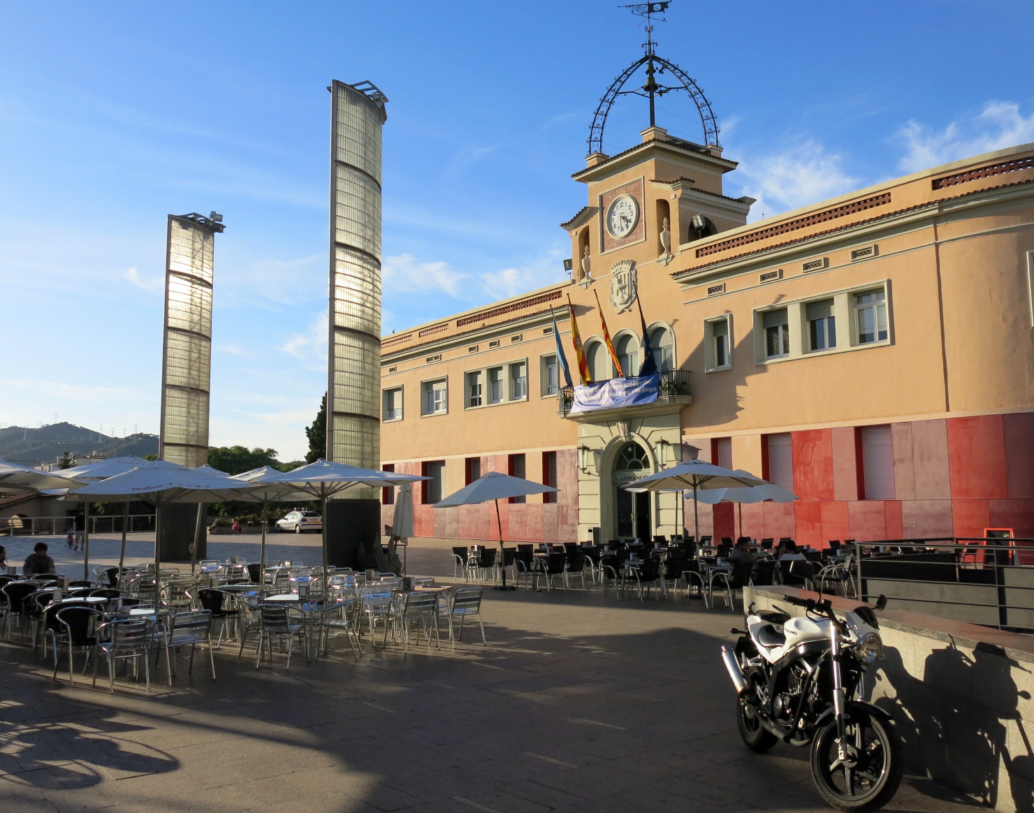 Casa de la Vila (Santa Coloma de Gramenet)